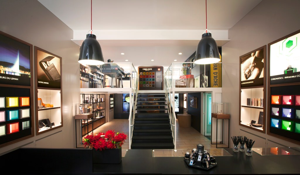 Espace dédié à la marque Caran d'Ache dans la papeterie Brachard.